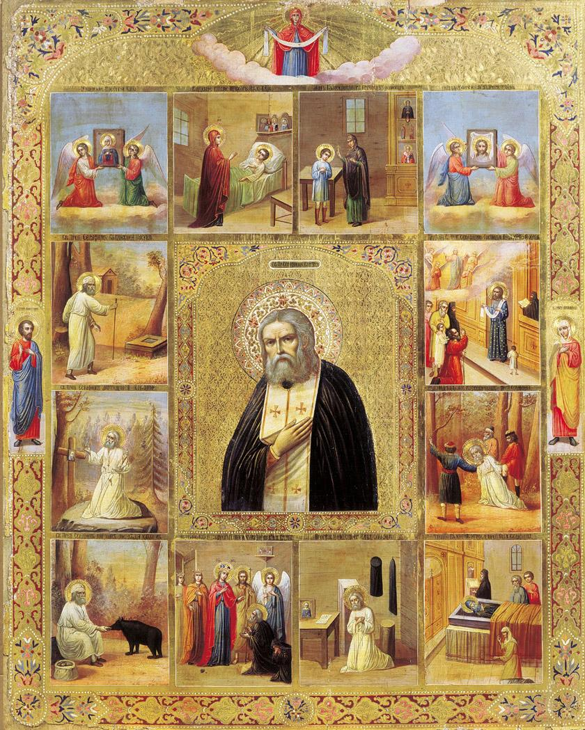 A vida de São Serafín.